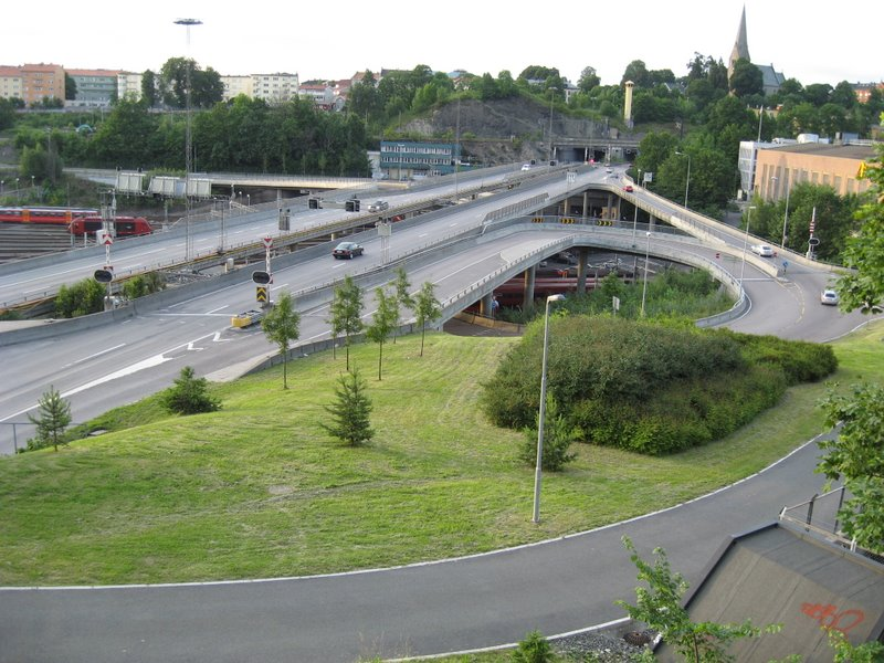 Trafikkmaskinen med Lodalsbruene strekker seg mellom Vålerenga i nord og Ekebergskrenten i sør, her sett fra sør inn mot Vålerengatunnelen i nord. Her møtes E6 og Ring 2, over dalsøkket Lodalen hvor det er en jernbanebase. Trafikkmaskinen, som åpnet i 1995, definerer skillet mellom strøkene Kværner i øst og Gamlebyen i vest.